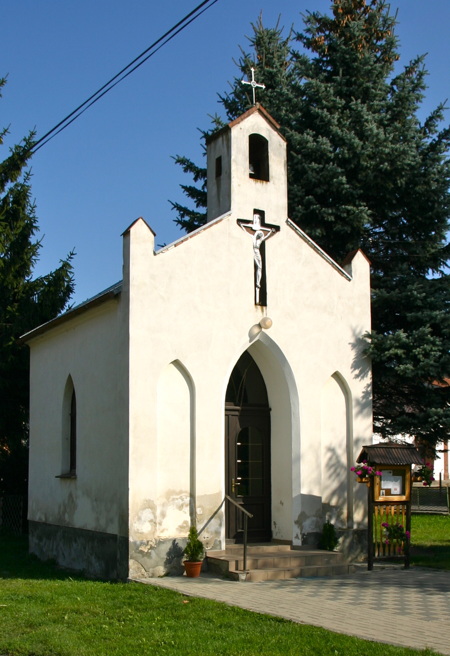 Wilków (dodatkowa nazwa w j. niem. Wilkau) – wieś w Polsce położona w województwie opolskim, w w powiecie prudnickim, w gminie Biała.